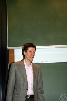 Foto di László Székelyhidi